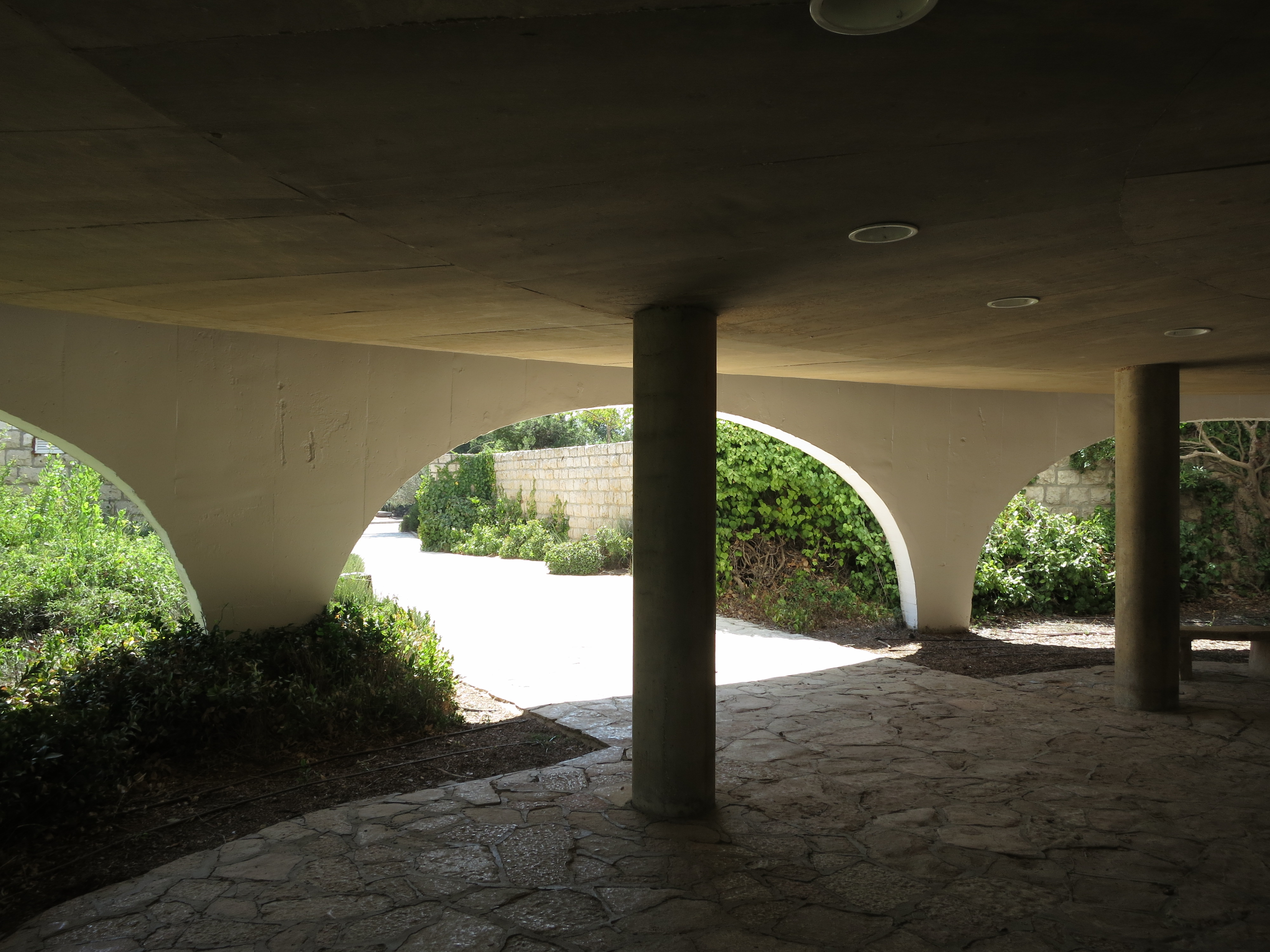 בית הכנסת האוניברסיטאי ע"ש ד"ר ישראל גולדשטיין נמצא בקמפוס גבעת רם של האוניברסיטה העברית בירושלים.